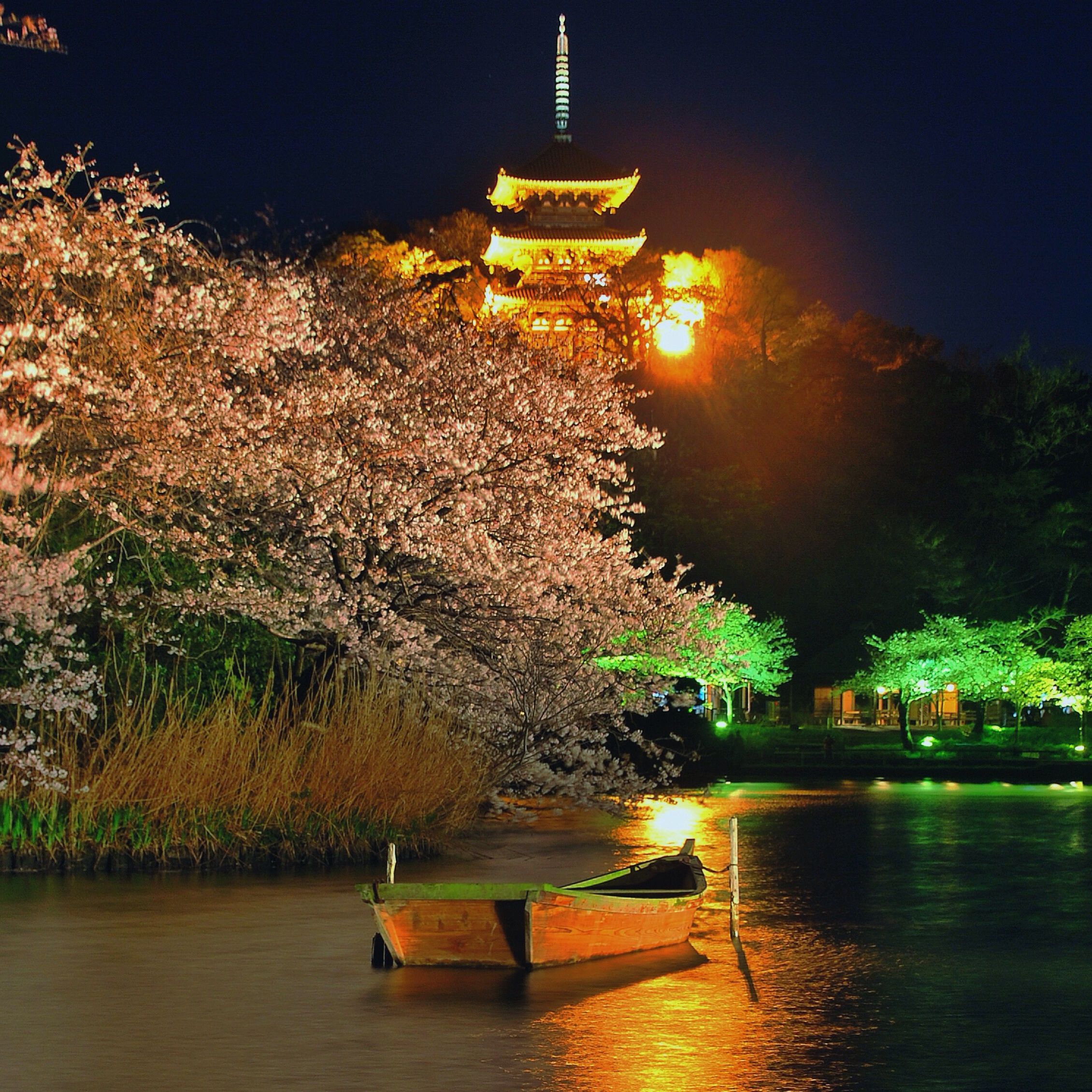 58 Honmokusannotani, Naka-ku, Yokohama-shi, Kanagawa-ken 231-0824, Japan